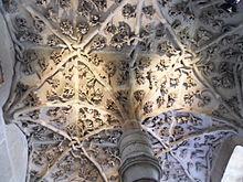 věž jana